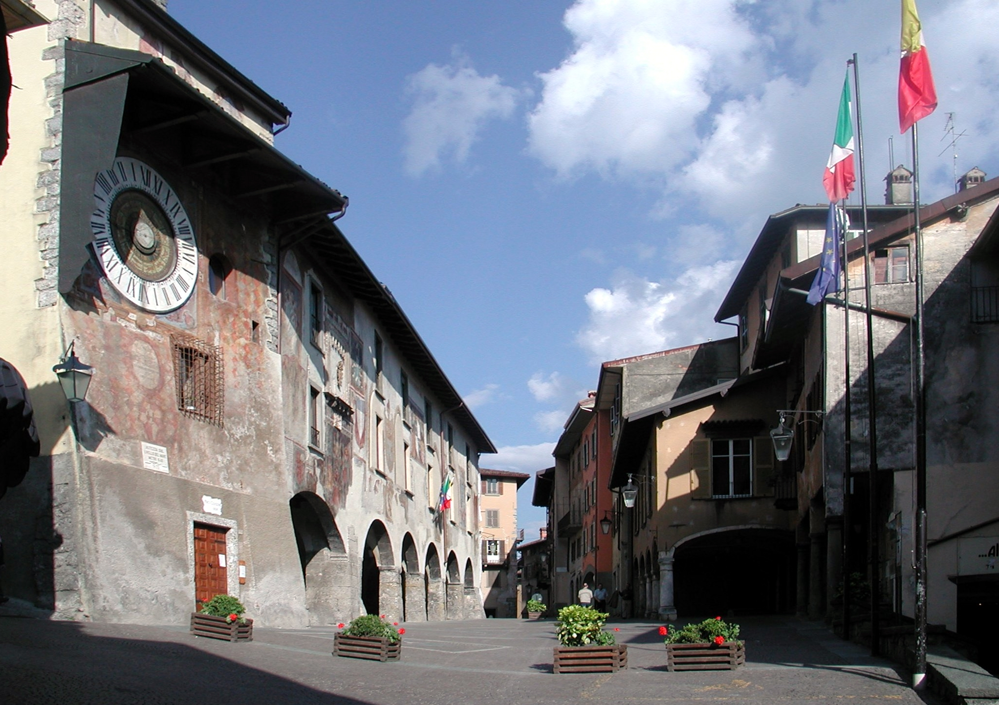 Clusone provincia di Bergamo Italy Piazza dell'Orologio